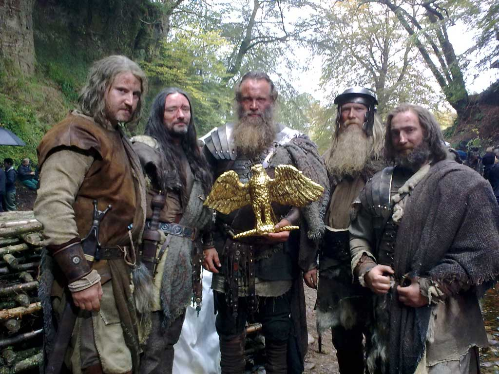 Combat International während der Dreharbeiten zum Film The Eagle 2011 Charlie Allan mit Adler, rechts daneben Kevin Johnston(Saor Patrol)